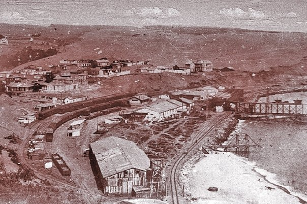 san antonio en el año 1915 aprox.